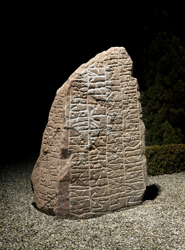 DR 212. Foto: Nationalmuseet ved Roberto Fortuna